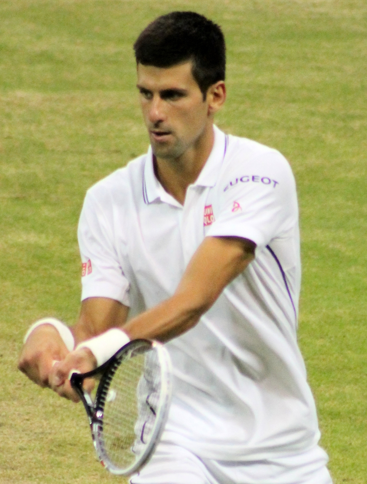 Djokovic WM14 (25)